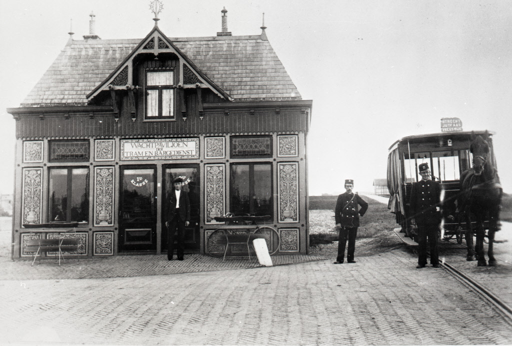 Gezicht op het wachtpaviljoen van de Tram- en Bargedienst Vereeniging (T.B.V.) bij de Koninginnesluis te Vreeswijk, met voor de ingang paviljoenbeheerder Piet Smith en bij de paardentram conducteur Piet Kaptein en een koetsier.